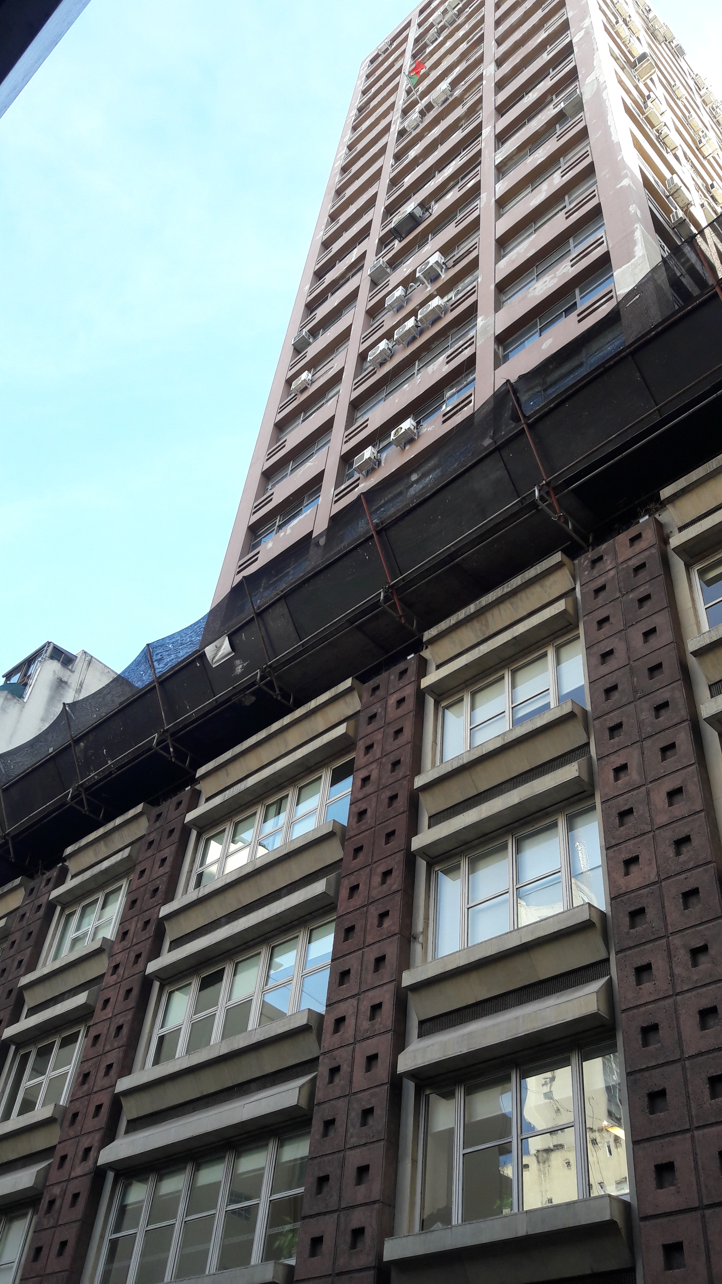 Embajada de Portugal en Buenos Aires. Maipú 942, Buenos Aires.